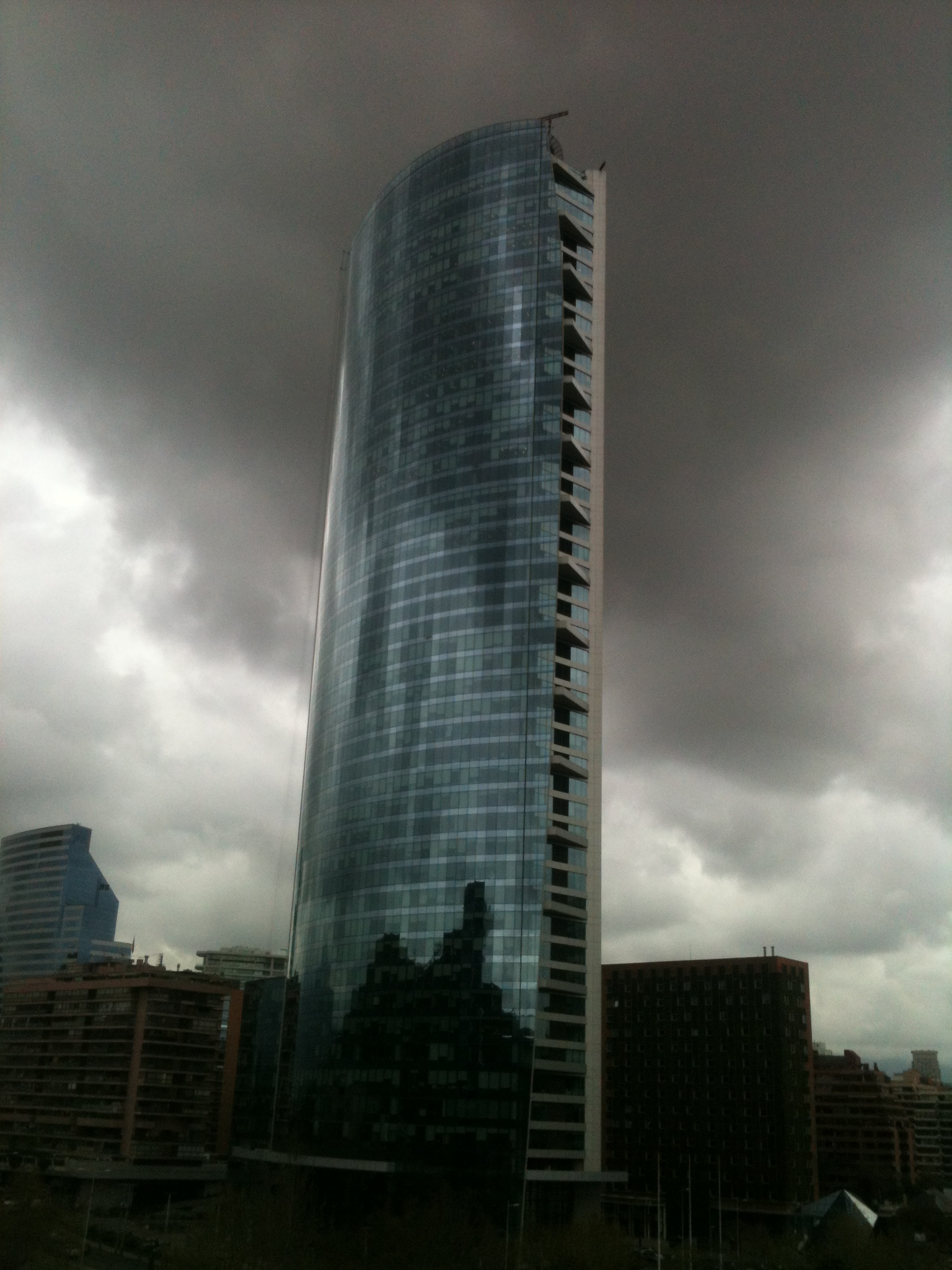 Titanium